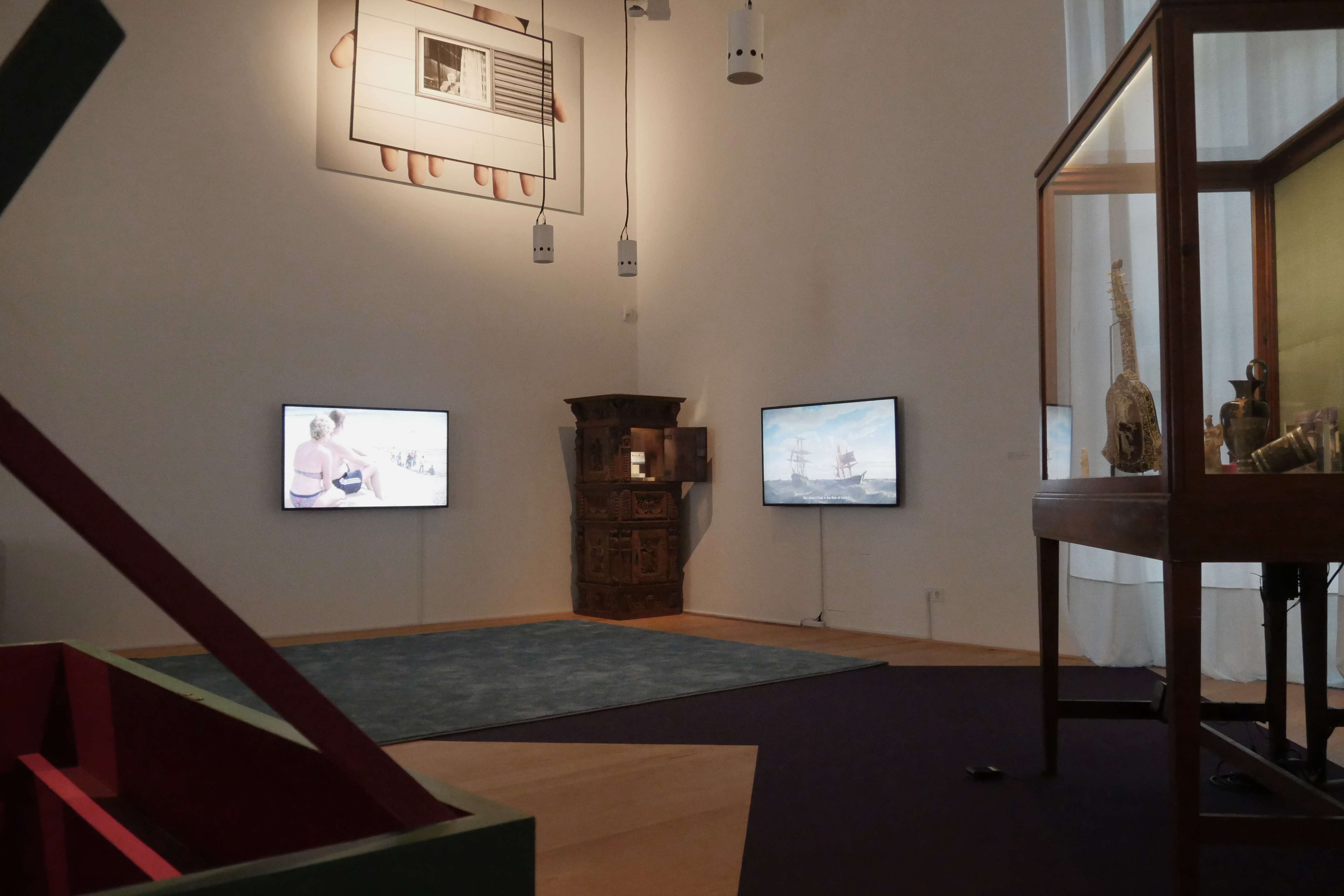 "Schiffe mit Waren und Stoffen aus aller Welt stoßen mit ihren Wellen die Bibby Challenge an" - eine multimediale Installation von Adnan Softic